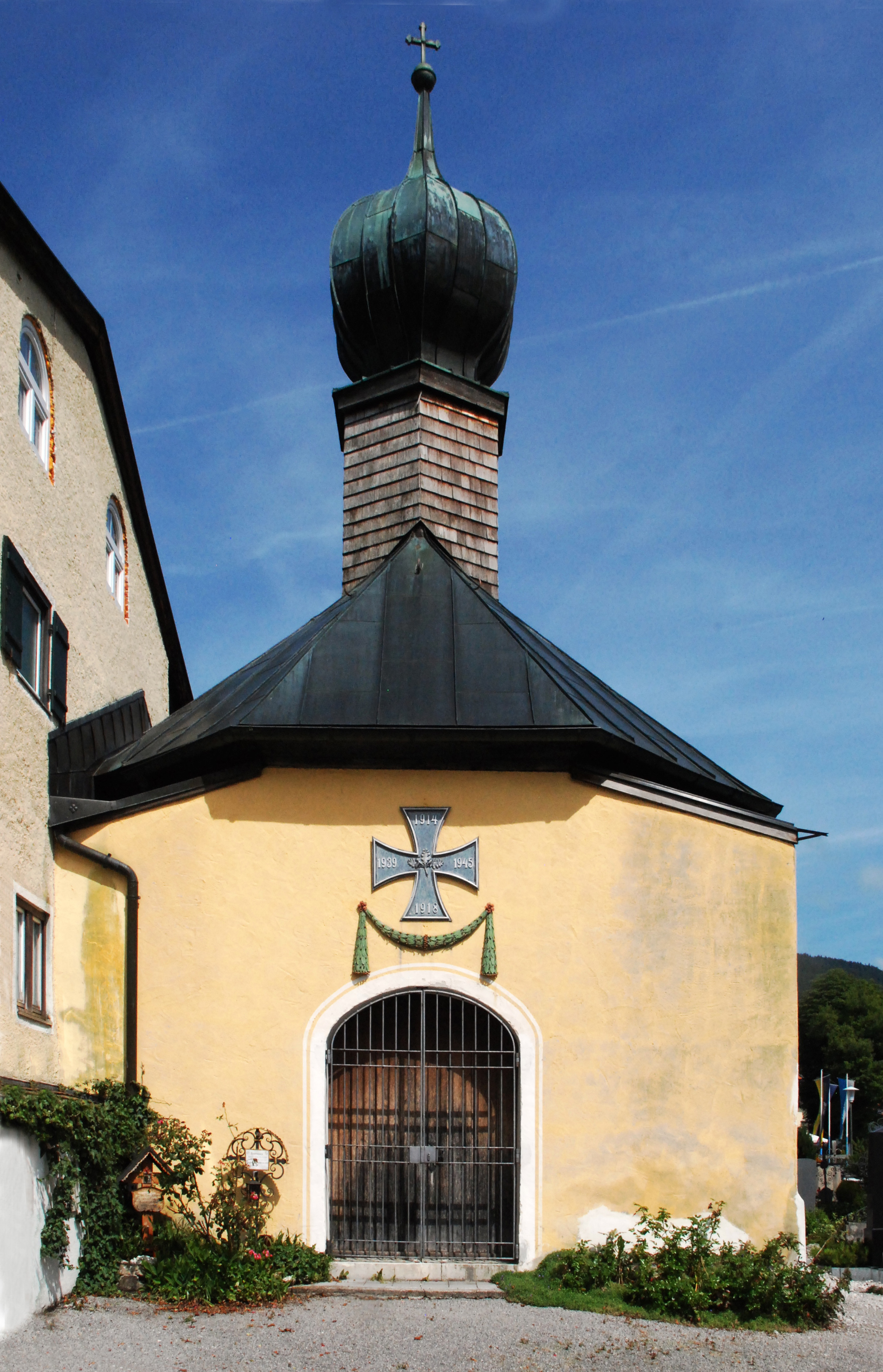 Friedhofskapelle, dann Kriegerdenkmal, auf dem Friedhof von St. Sixtus in der Seestraße 1 in Schliersee, Landkreis Miesbach, Bezirk Oberbayern, Bayern. Als Baudenkmal in der Bayerischen Denkmalliste unter Aktennummer D-1-82-131-23 aufgeführt. Laut Denkmalliste in der zweiten Hälfte des 15. Jahrhunderts erbaut, 1635 barockisiert.